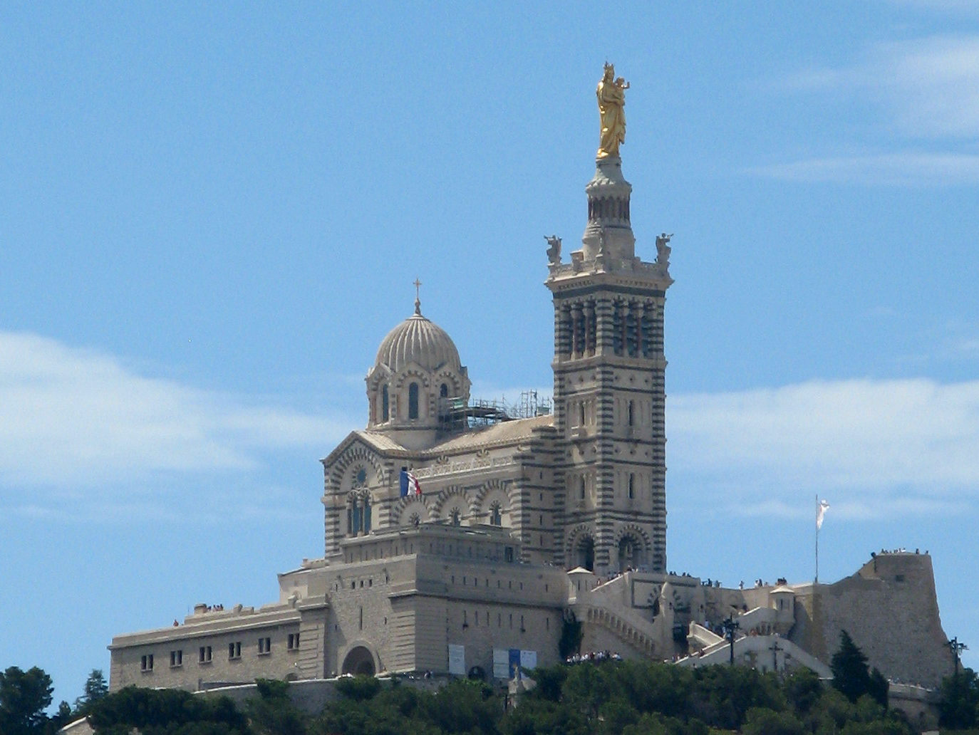 Notre Dame de la Garde (Marseille, France), vue du vieux port